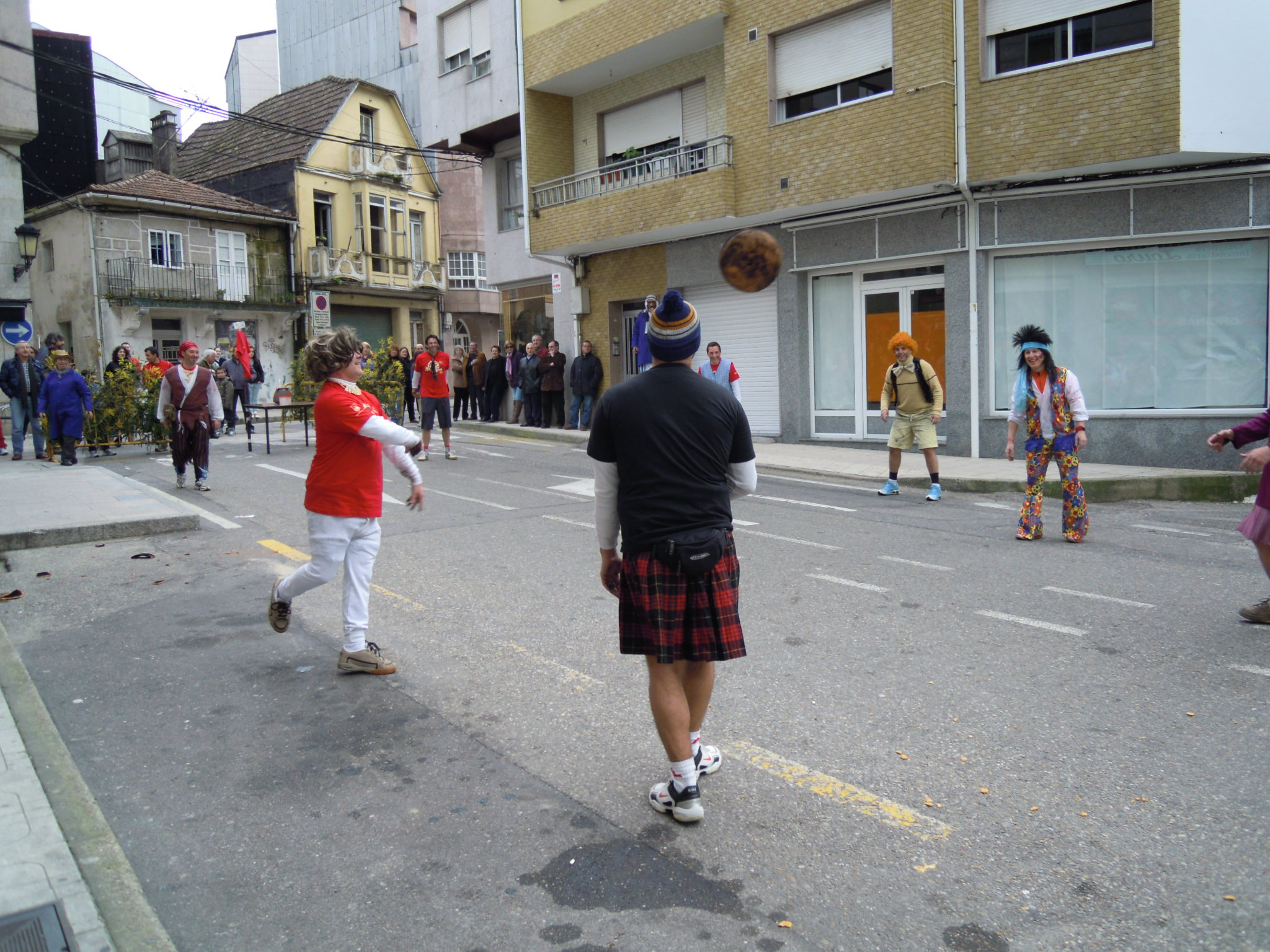 Celebración do xogo da Ola no Porriño, Galicia, España.